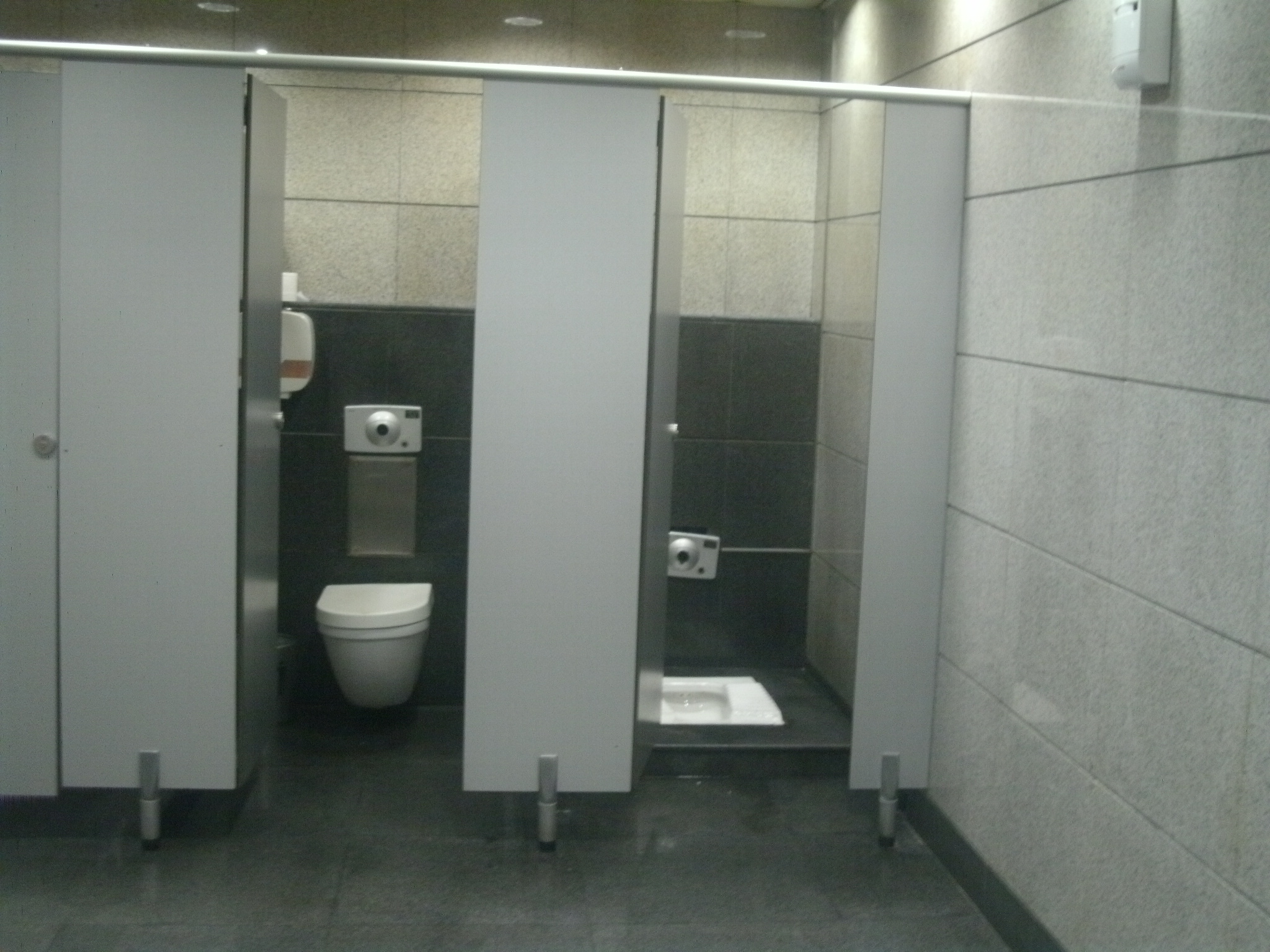 出国後エリアの男子トイレ。洋式便器の他、しゃがみこみ式トイレの設置もある。